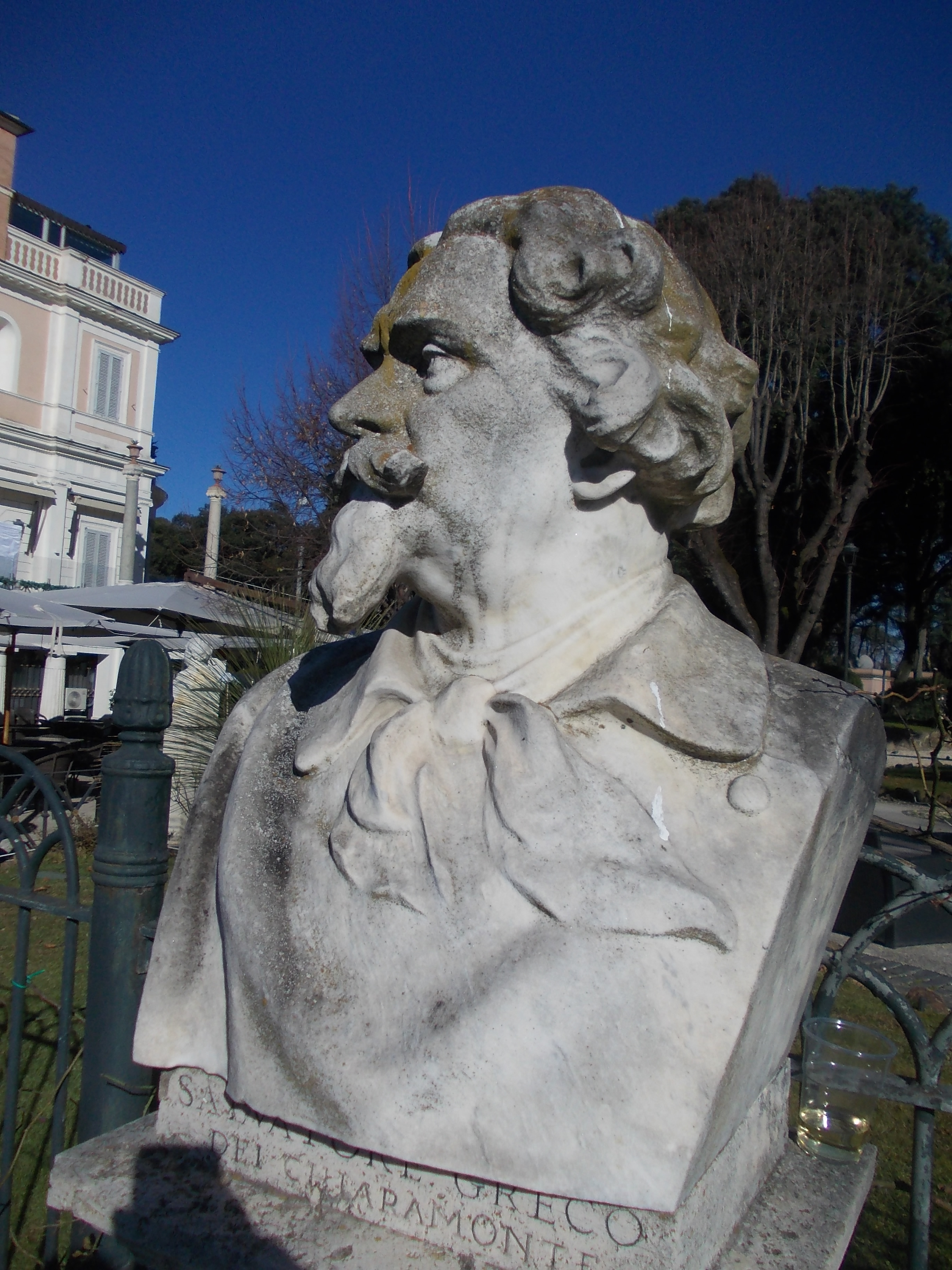 Busto in marmo dello schermidore e patriota italiano Salvatore Greco dei Chiaramonte, al Pincio, Roma